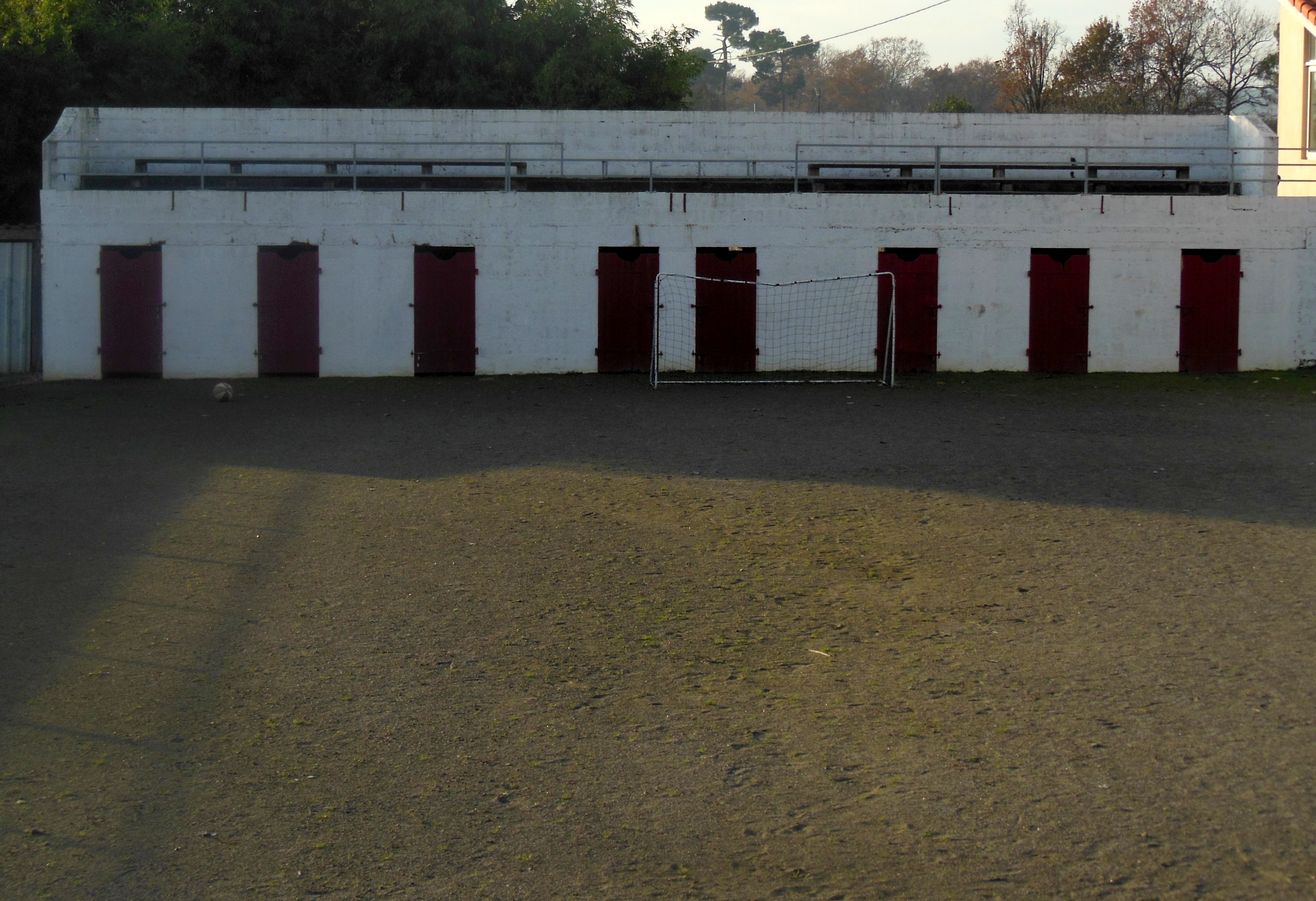 Arènes d'Hauriet (Landes, France)